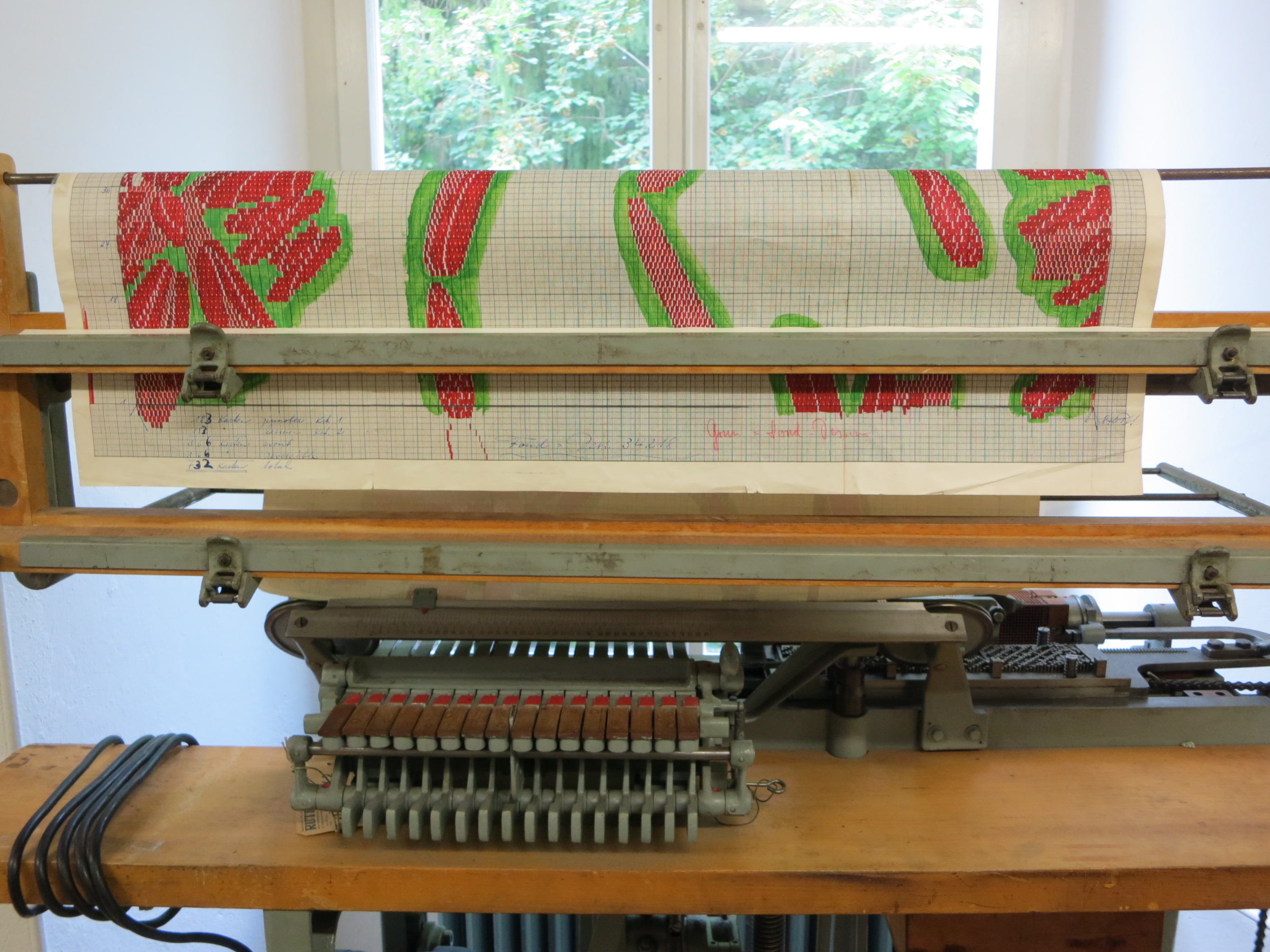 Kartenschlagmaschine mit Patrone, Museum Industriekultur Neuthal, Bäretswil ZH, Schweiz